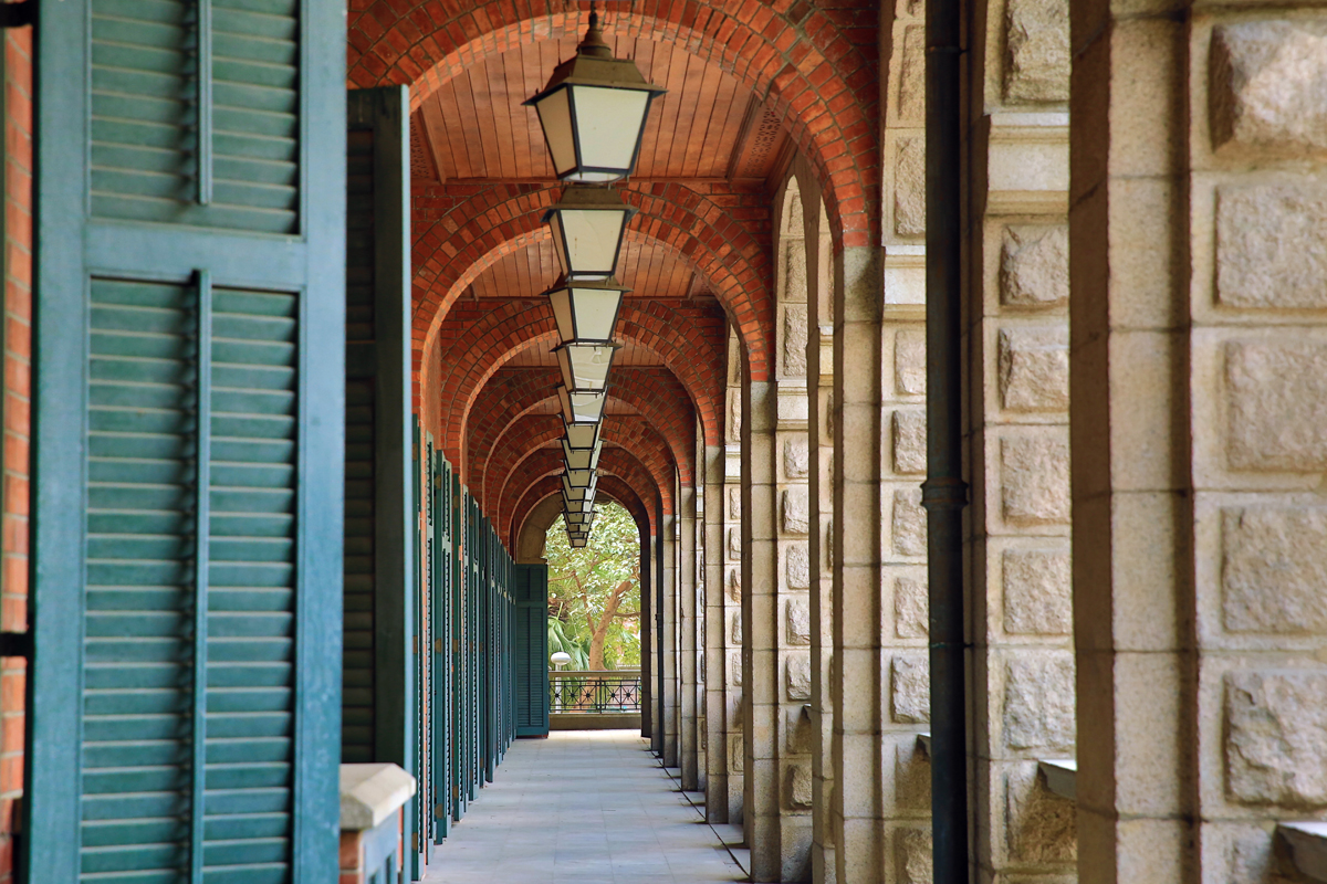 舊精神病院正立面